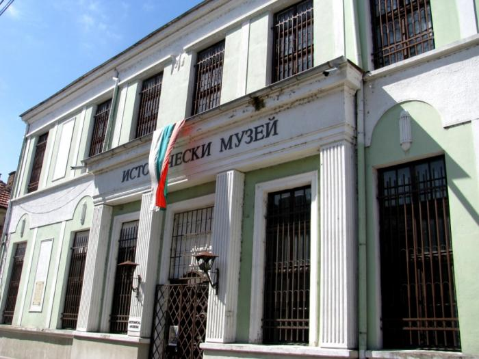 Историческият музей в Лом